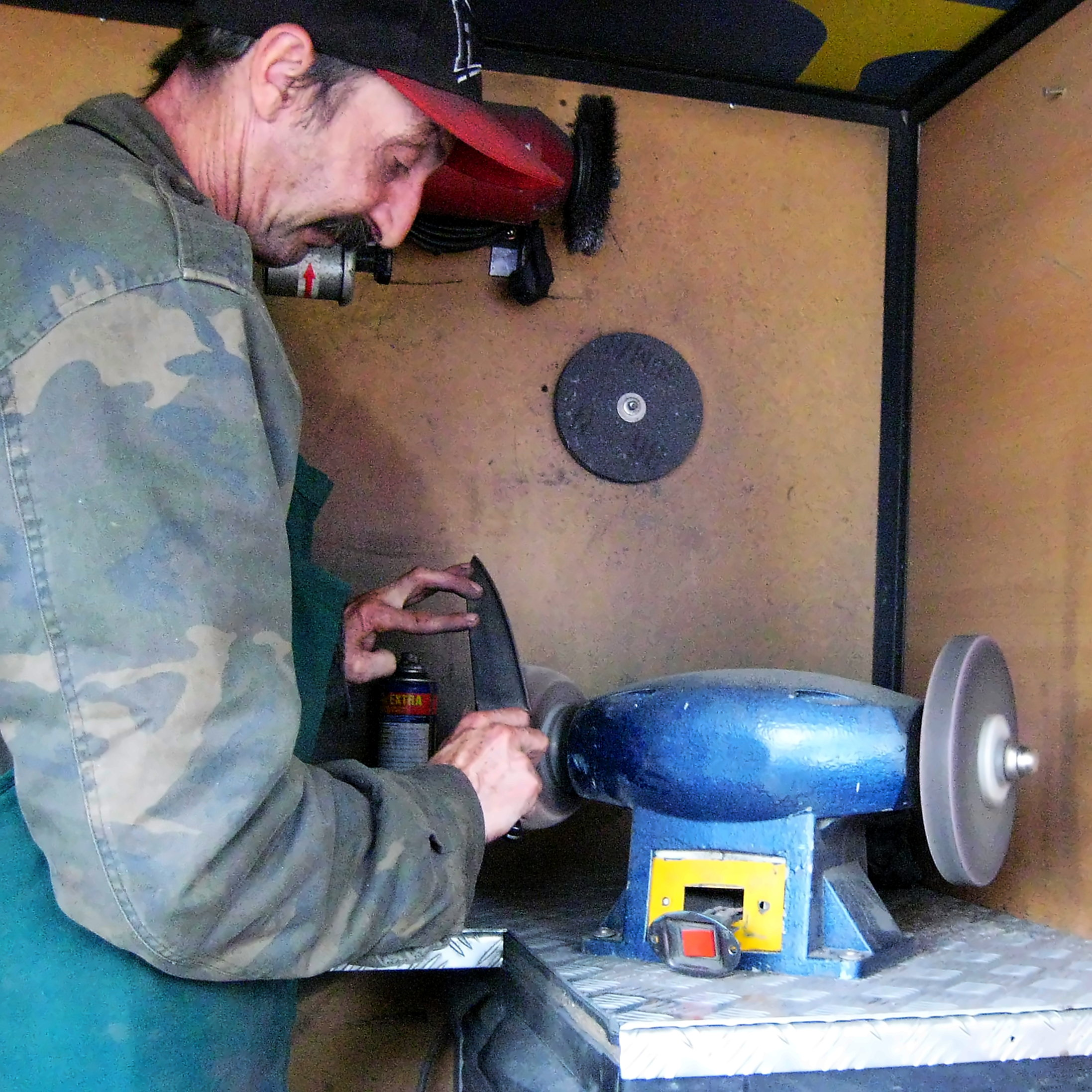 Scherenschleifer Jürgen Schneider beim Schärfen eines Kochmessers an einer (ölgetränkten) Diamant-Schleifscheibe – an einer elektrisch betriebenen Schleifmaschine in einem Werkstattanhänger der Mobilen Scherenschleiferei – Familienschleiferei R. Rose, die hier in Bremen-Osterholz Station macht.